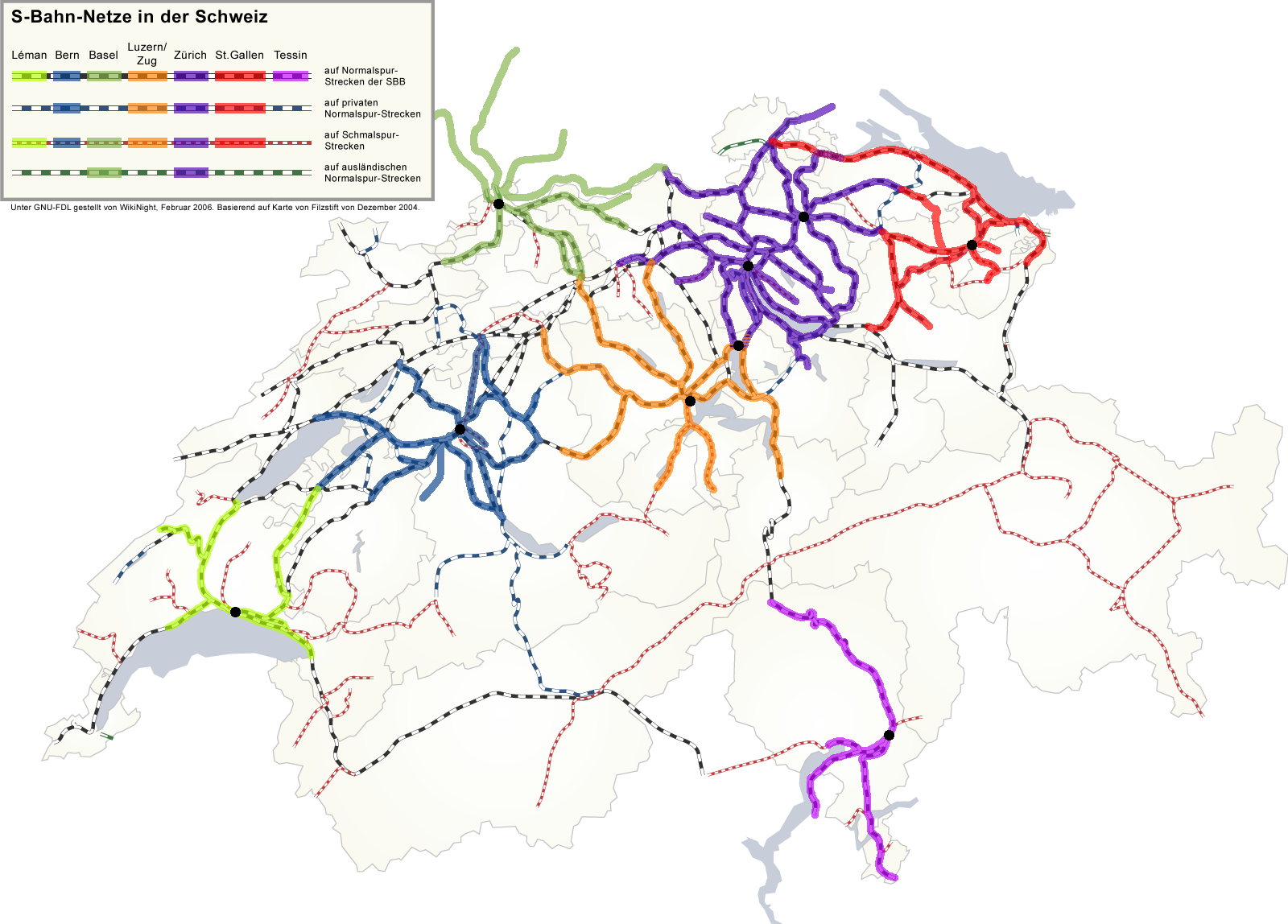 Karte der S-Bahn-Netze in der Schweiz. (Farben dienen nur der Abgrenzung)